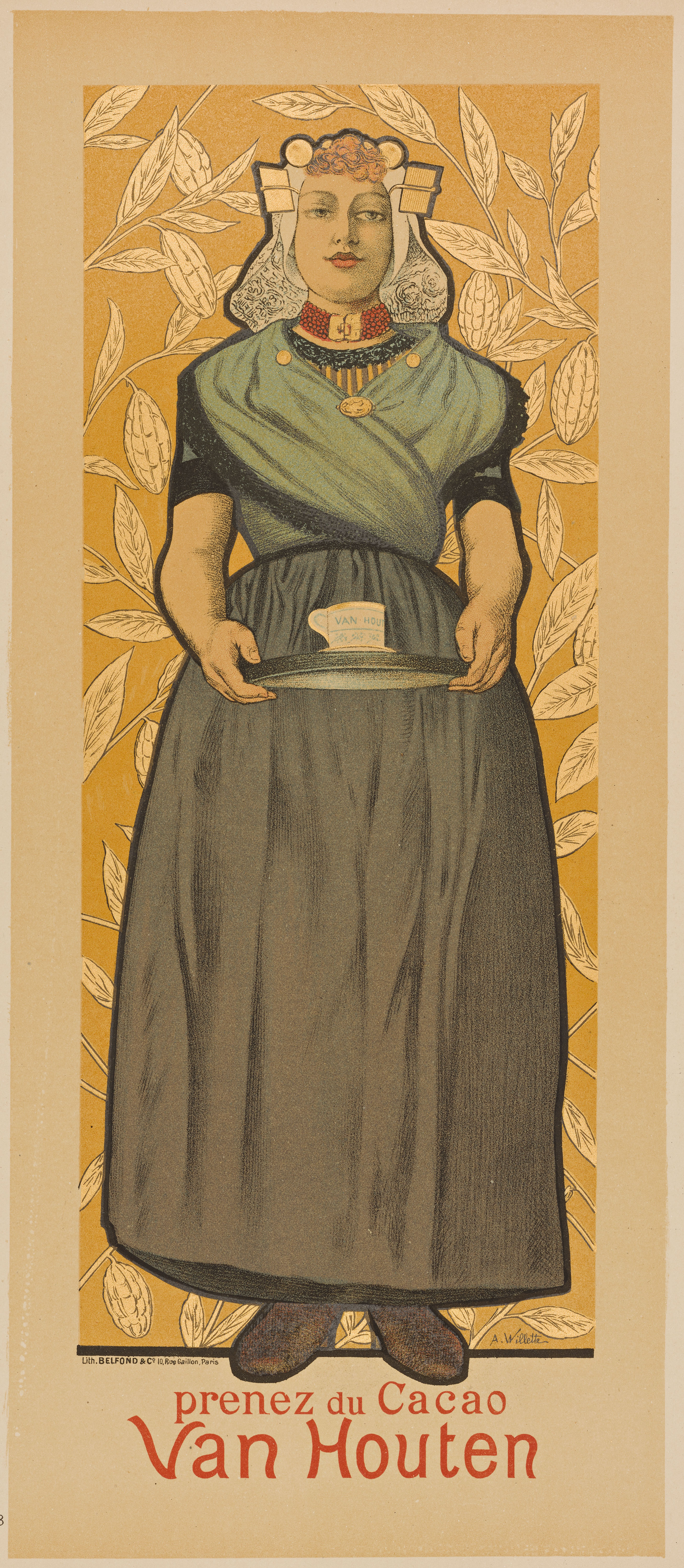 Planche 43 du Les Maîtres de l'Affiche : publication mensuelle contenant la reproduction des plus belles affiches illustrées des grands artistes, français et étrangers, éditée par L'Imprimerie Chaix, Premier Volume, Paris, 1896.